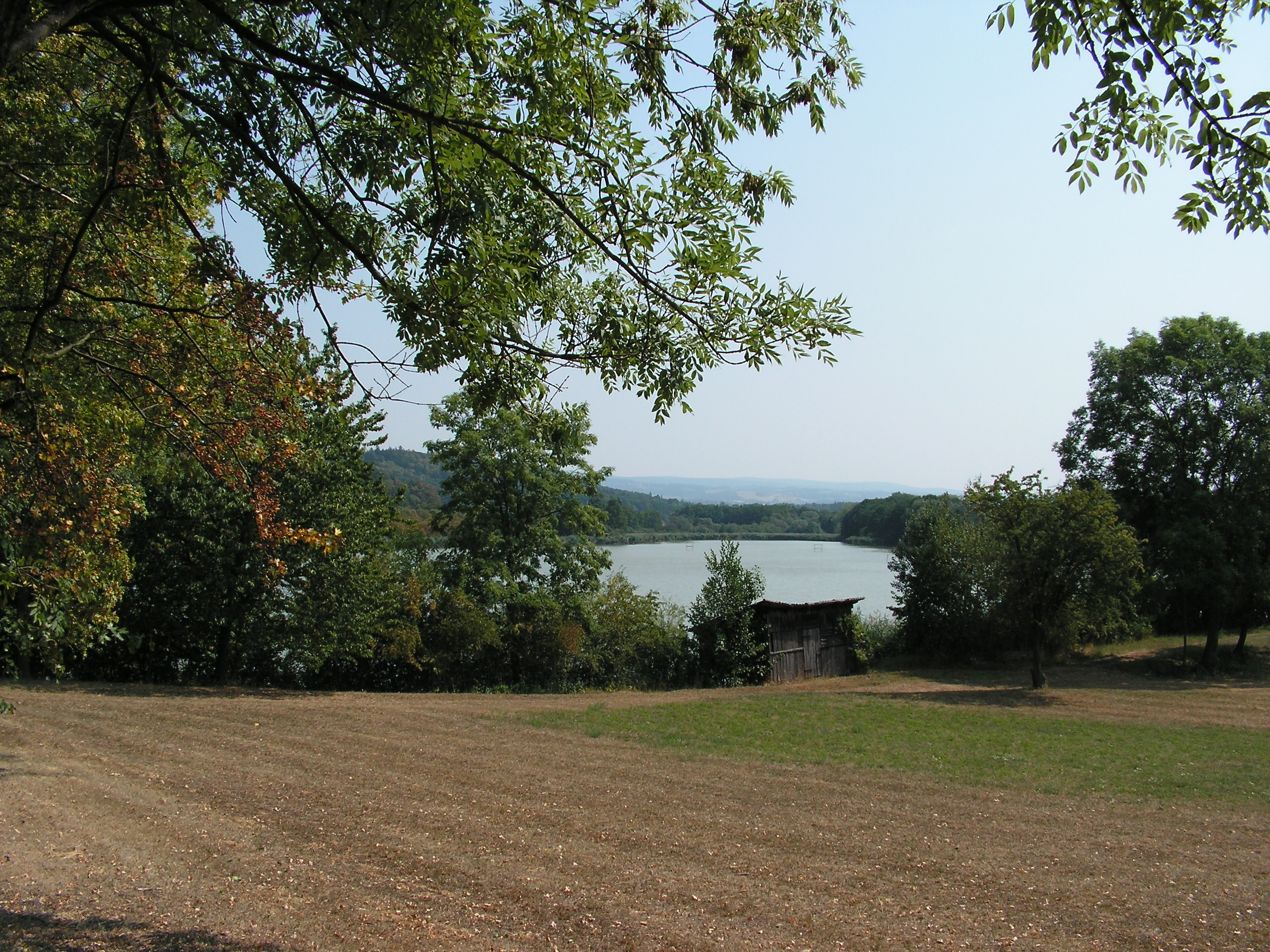 Semechnický rybník v okrese Rychnov nad Kněžnou